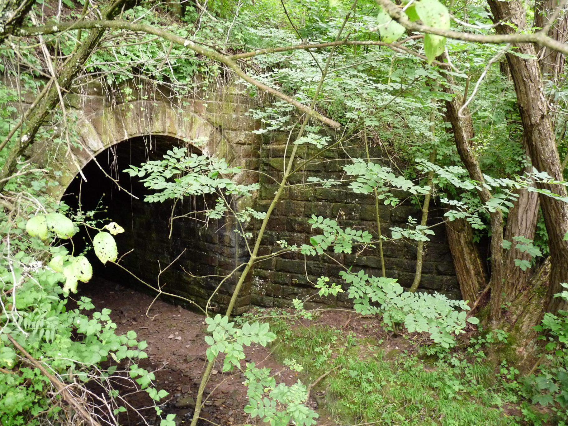 Brücke der Pforzheimer Kleinbahn über den Arnbach nahe der Grenzsägmühle bei Ellmendingen